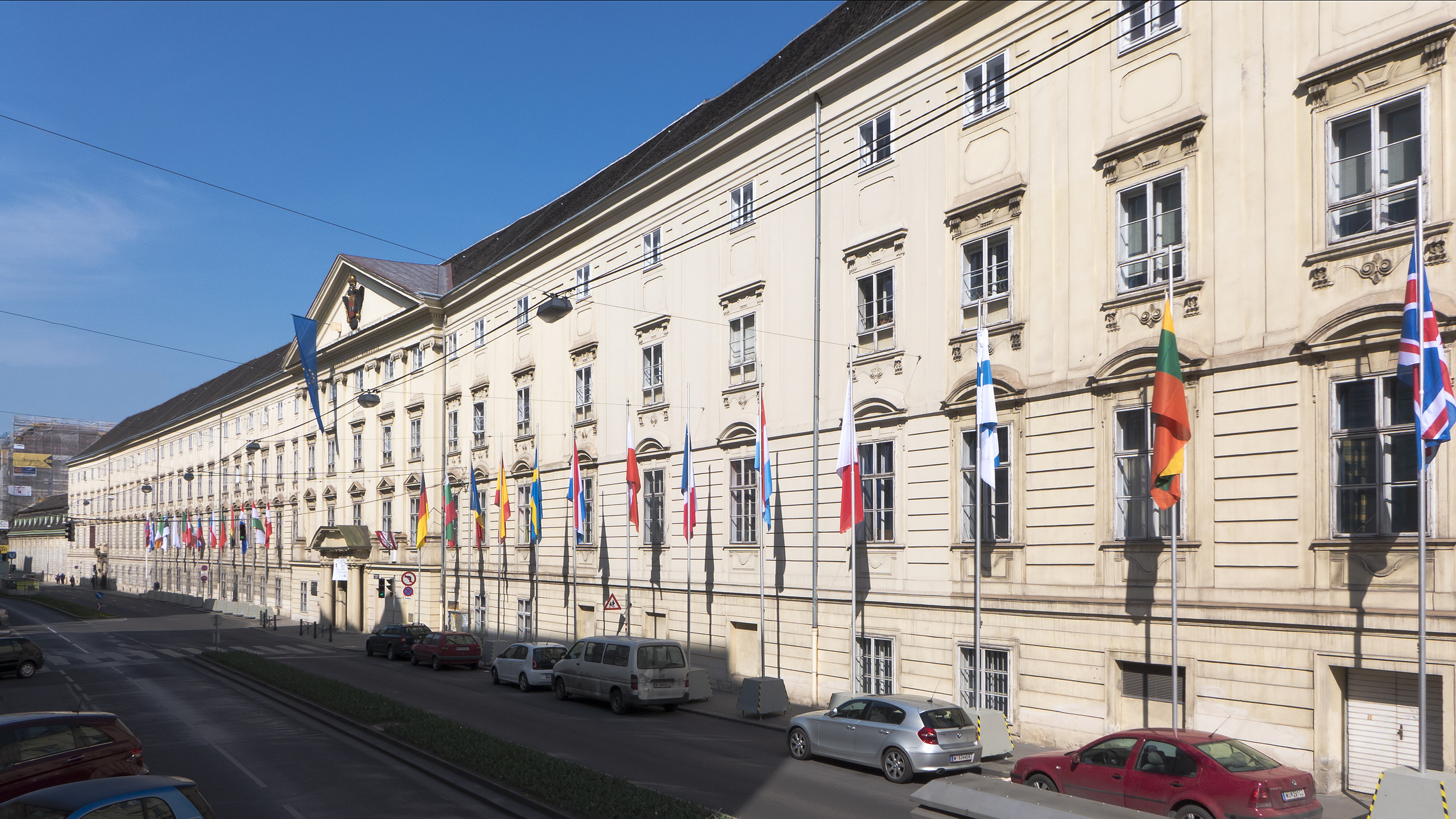 Theresianum in Wien 4 Richtung Nordosten